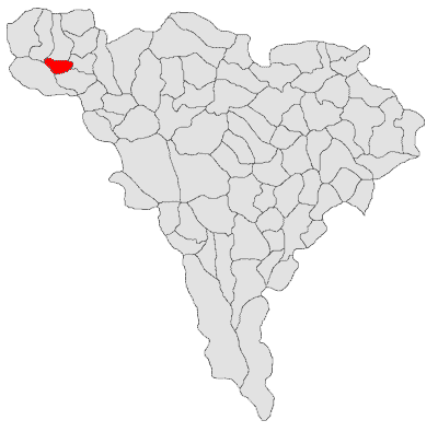 Categorie:Hărţi ale judeţului Alba